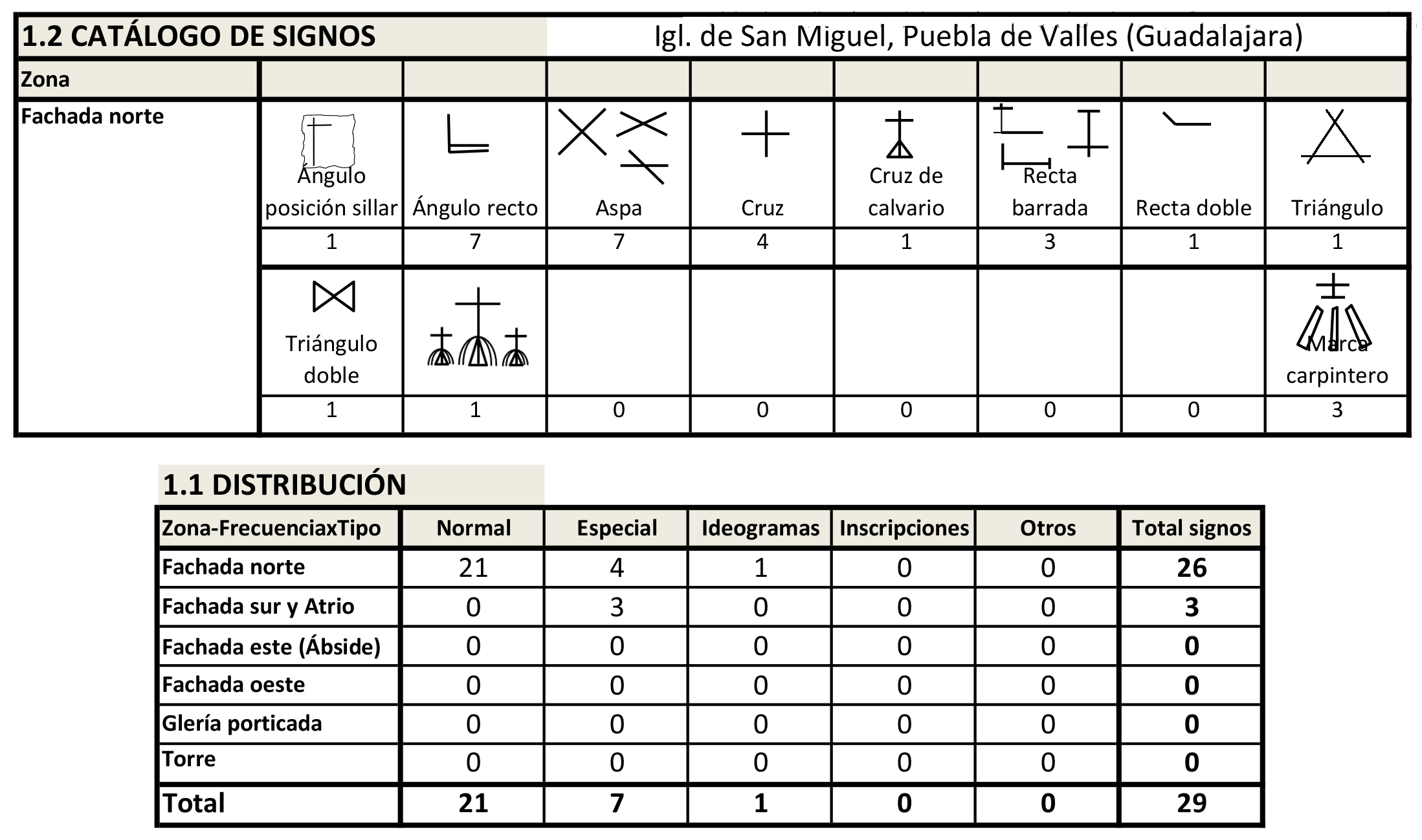 Iglesia de San Miguel, Puebla de Valles (Guadalajara), Castilla-La Mancha, España, románica-rural s. XVI. Catálogo de Signos lapidarios.